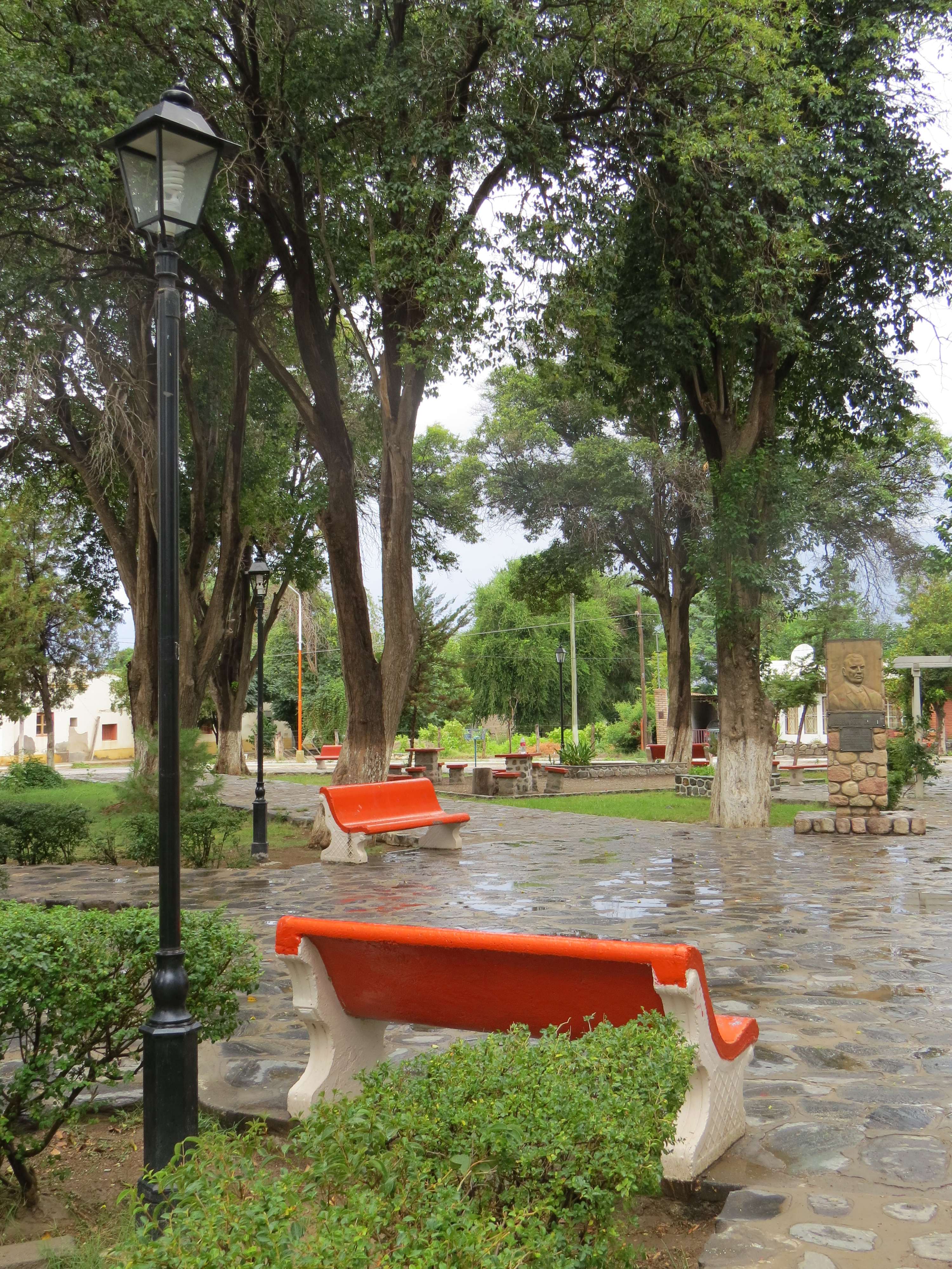 Colalao del Valle, Provincia de Tucumán.